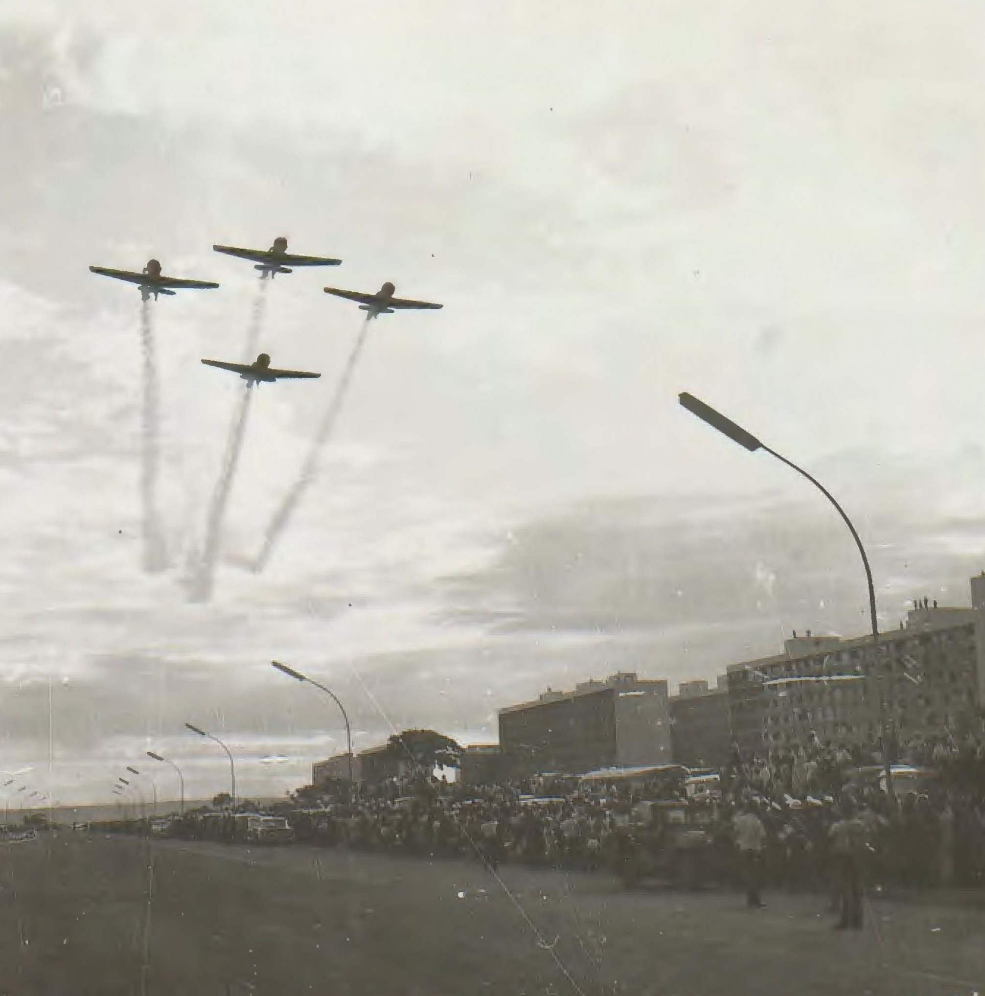 Fotografia do Fundo Correio da Manhã, sob a guarda do Arquivo Nacional.